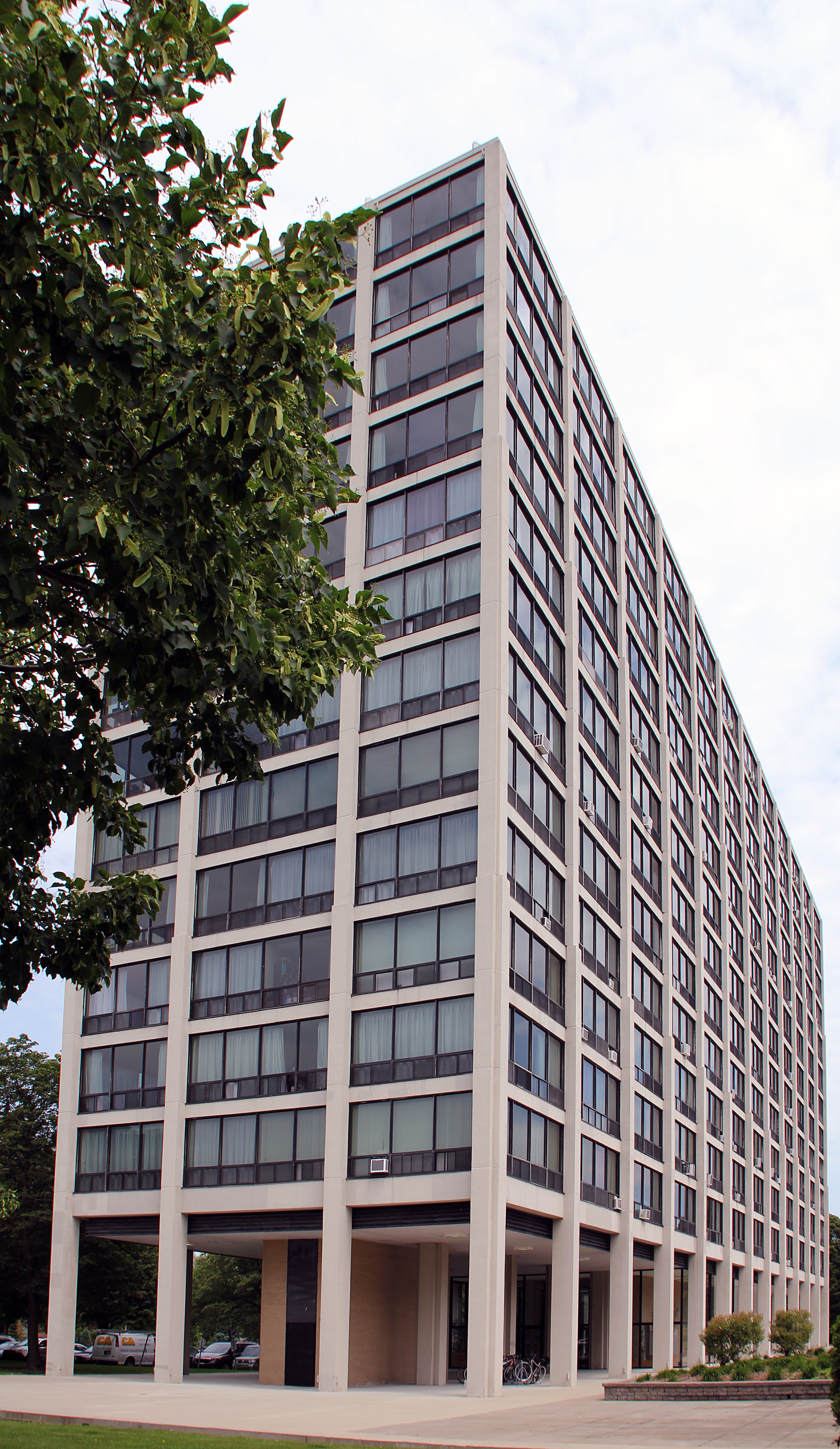 Façade ouest du 201 Corot sur l'île-des-Soeurs dans l'arrondissement Verdun à Montréal, Québec, Canada